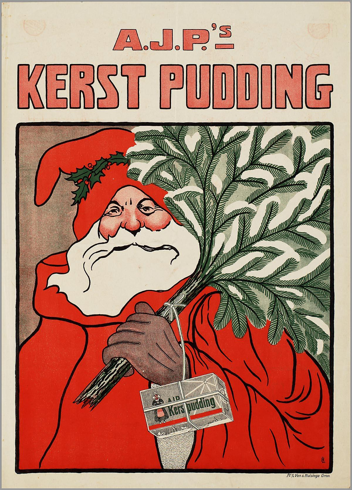 Affiche: A.J.P.'s Kerstpudding (Puddingfabriek A.J. Polak (Groningen)).